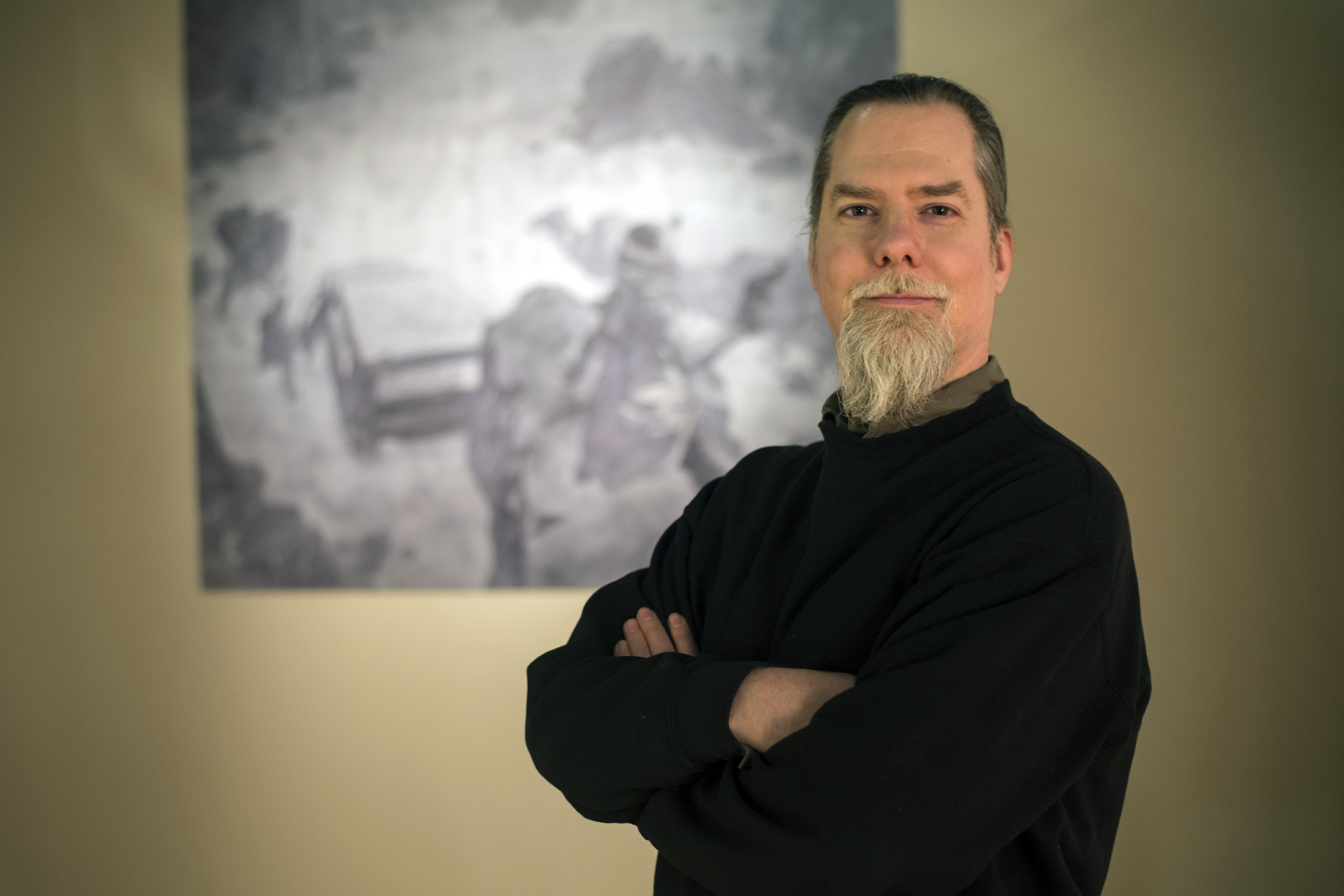 Le scénariste Yves H. au Festival d'Angoulême 2017.